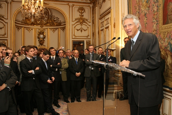 L'Association nationale des auditeurs jeunes de l'Institut des hautes études de défense nationale (ANAJ-IHEDN) reçue à Matignon à l'occasion de son 10e anniversaire (2006). Dominique de Villepin, Premier ministre.